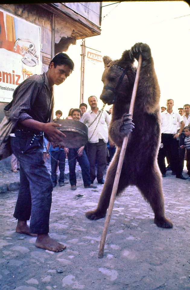 Samsun Amerikan Radar Üssü'nde görev yapan bir radar personelinin çektiği Samsun'da bir ayı oynatıcısı ve ayısı fotoğrafı.